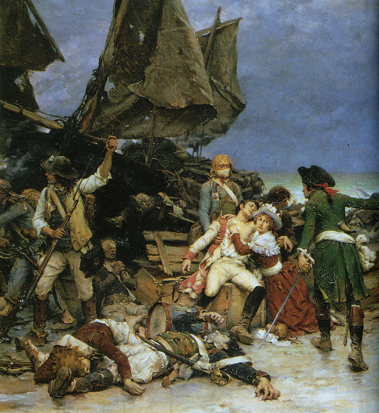 Episode de la déroute de Quiberon en 1795, détail.